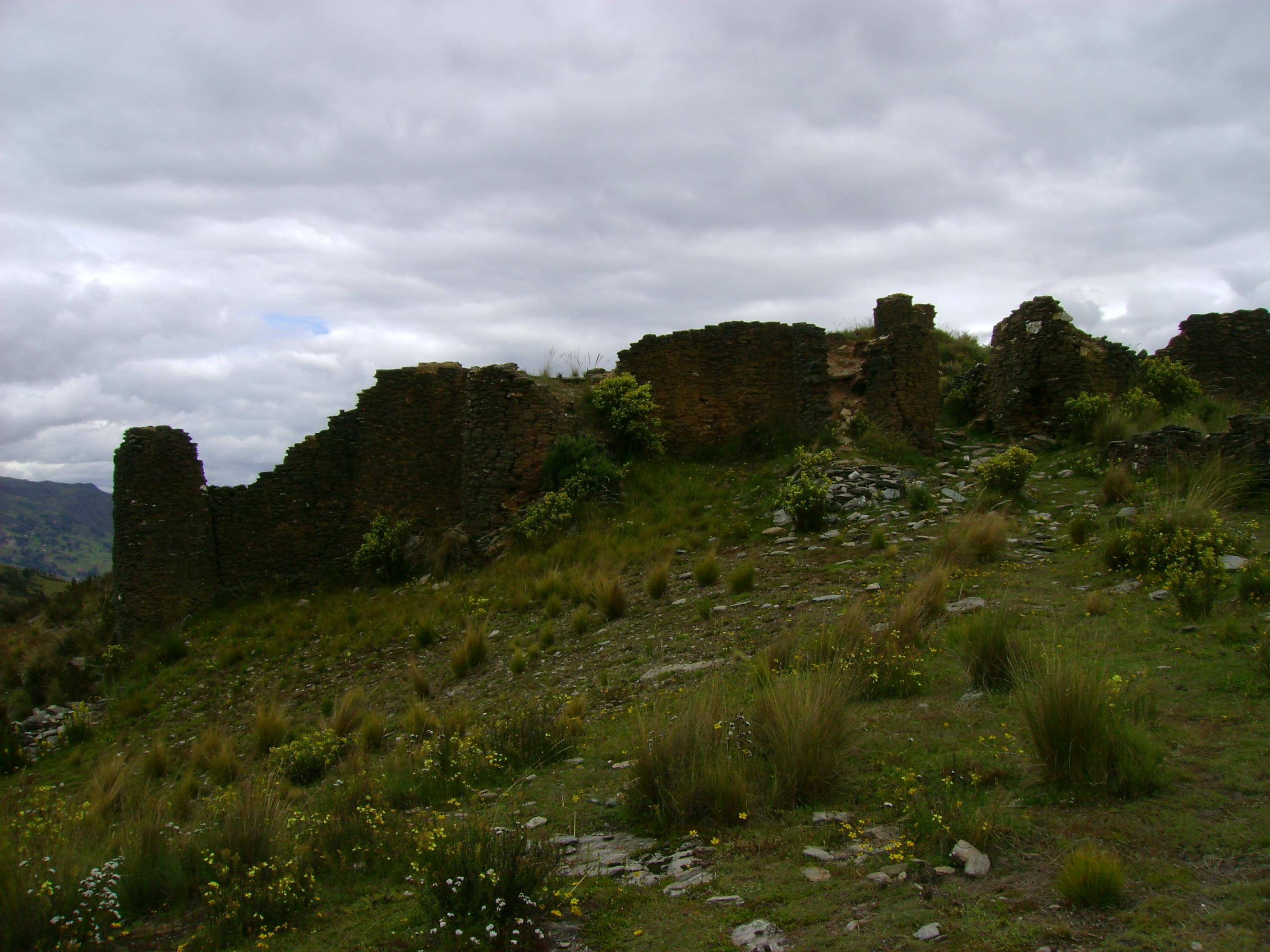 Mazur